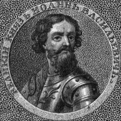 Великий князь Иоанн Васильевич.